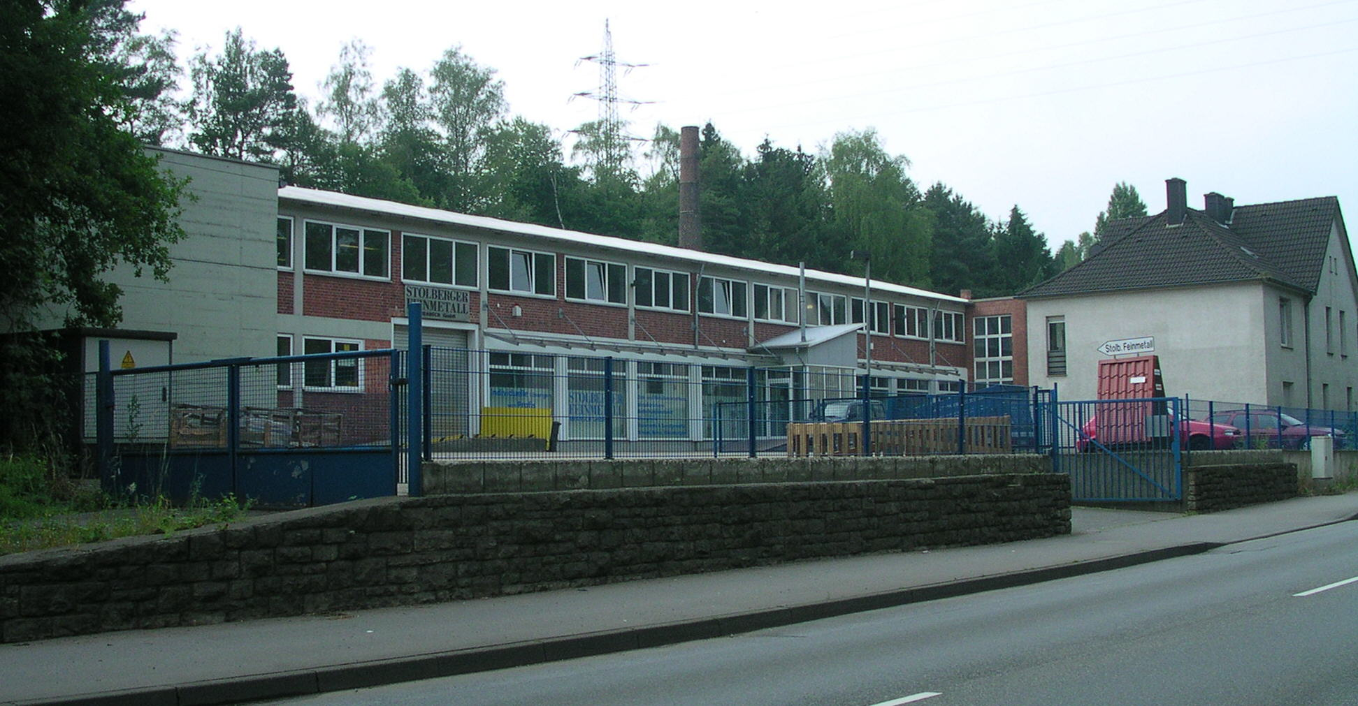 Stolberg, Firma Feinmetall